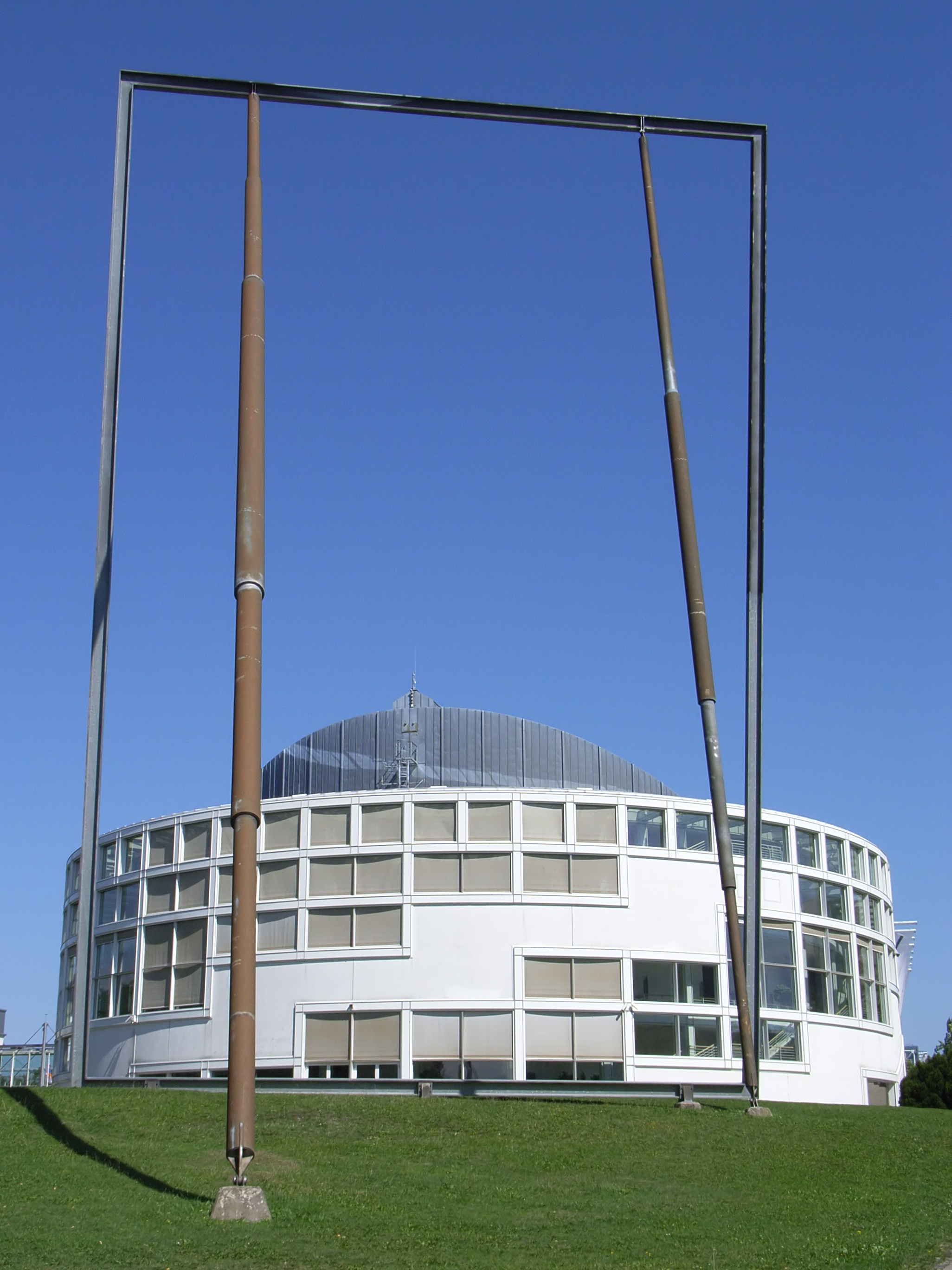 Bielefeld, Deutschland: Stadthalle mit der Skulptur „Spiegel“